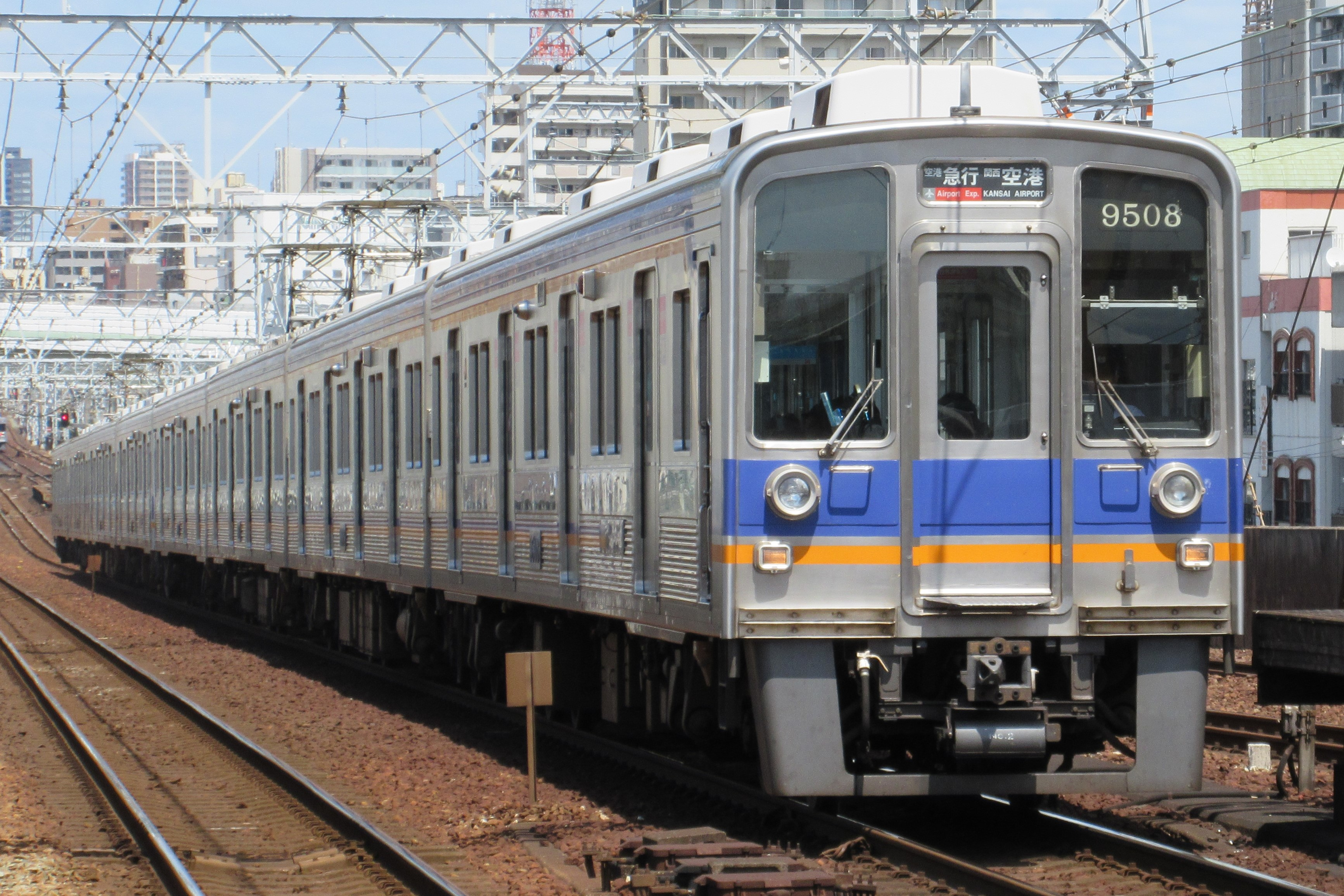 南海電鉄9508 (新今宮駅にて)